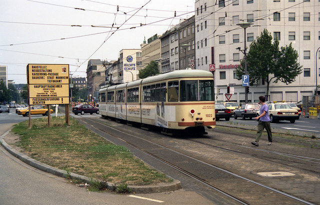 RHB tram on Kaiserring, Mannheim